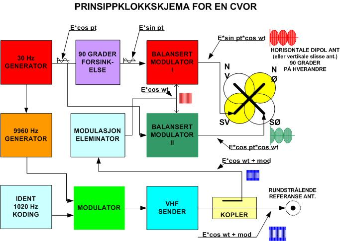 CVOR blikkdiagram